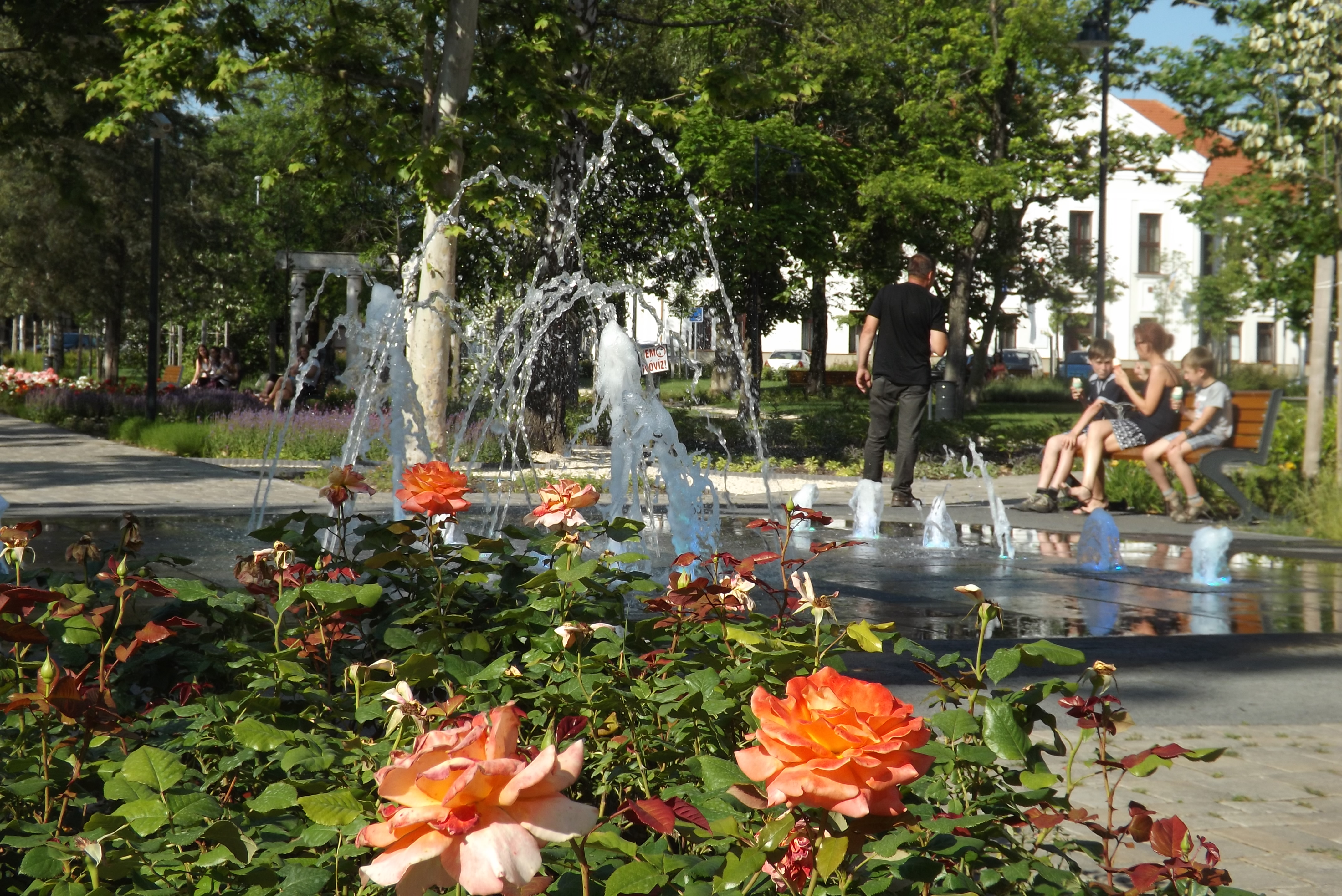 Kölcsey tér, Mátészalka